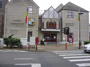 Commune de Manage, Belgium